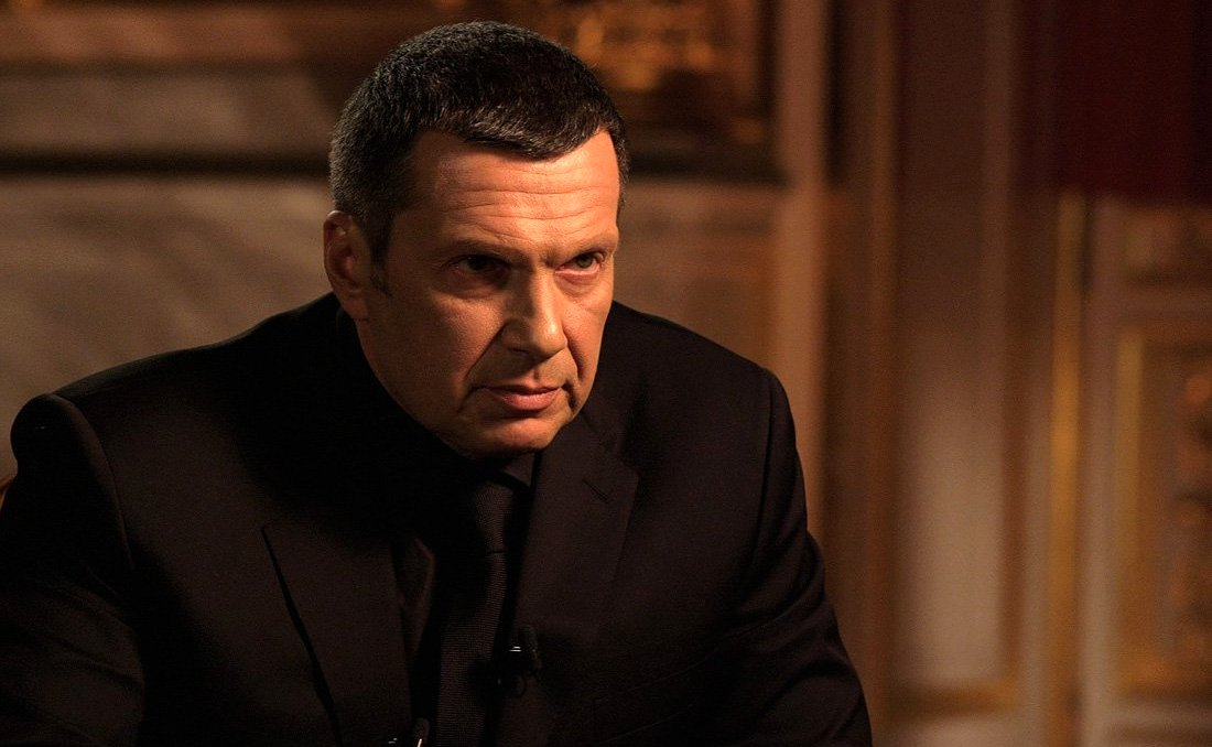 Журналист Владимир Соловьёв во время интервью Владимира Путина ВГТРК